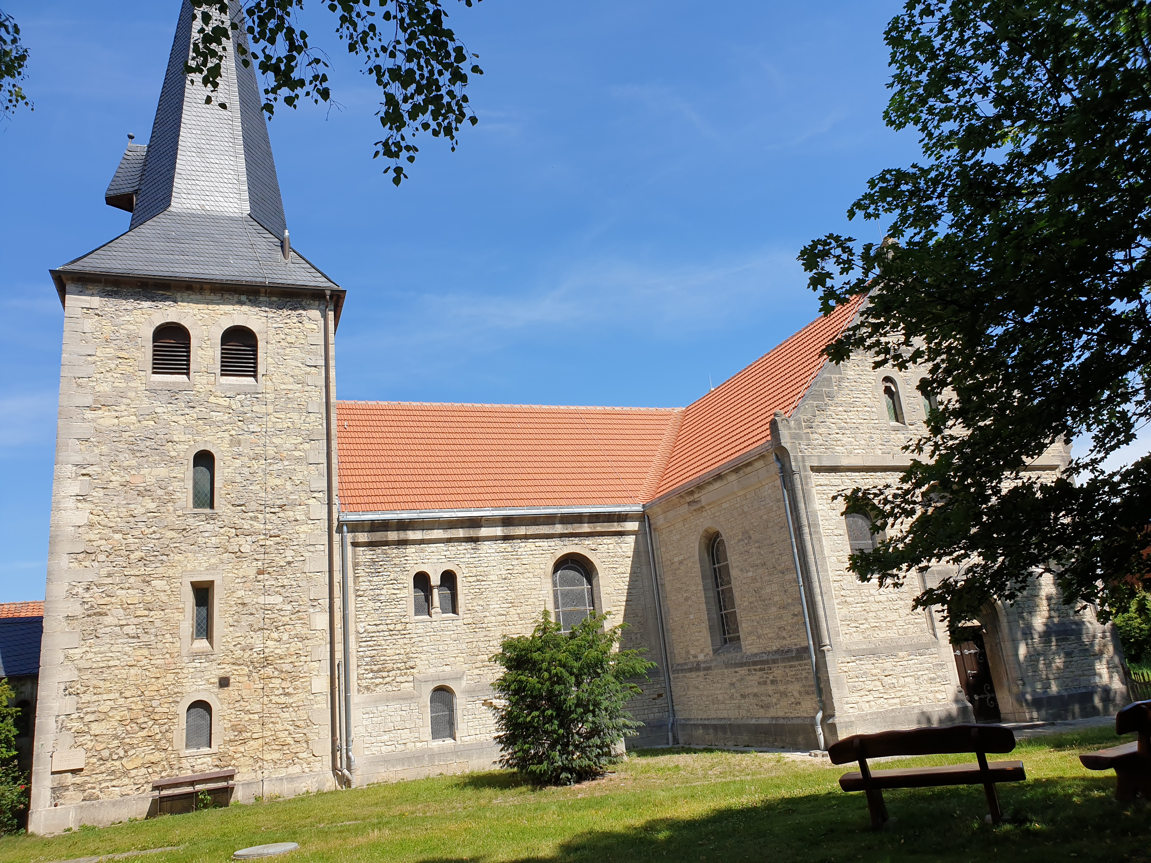 Winkelkirche in Gardessen